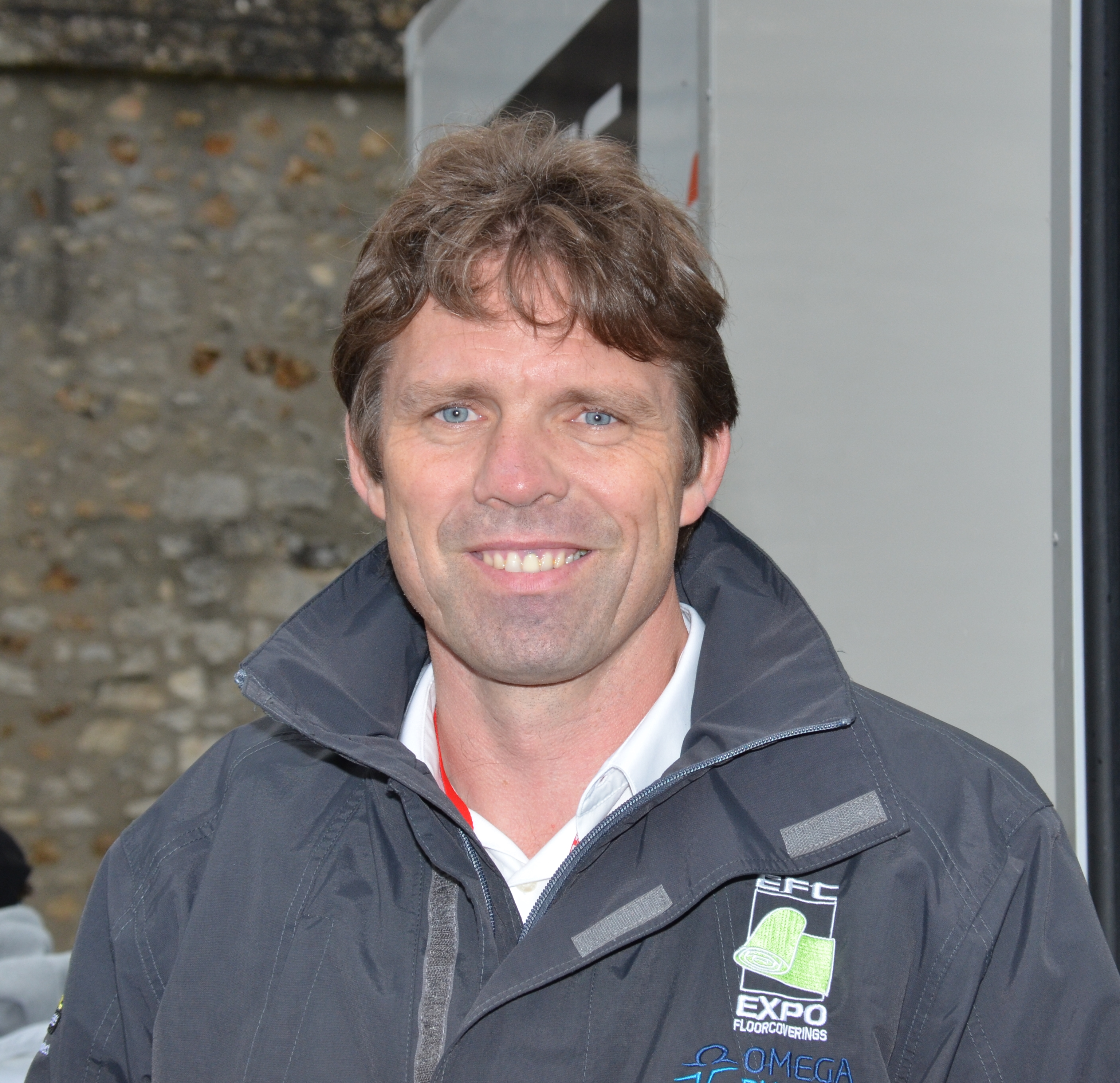 Vim Feys lors du Paris-Tours Espoirs 2012